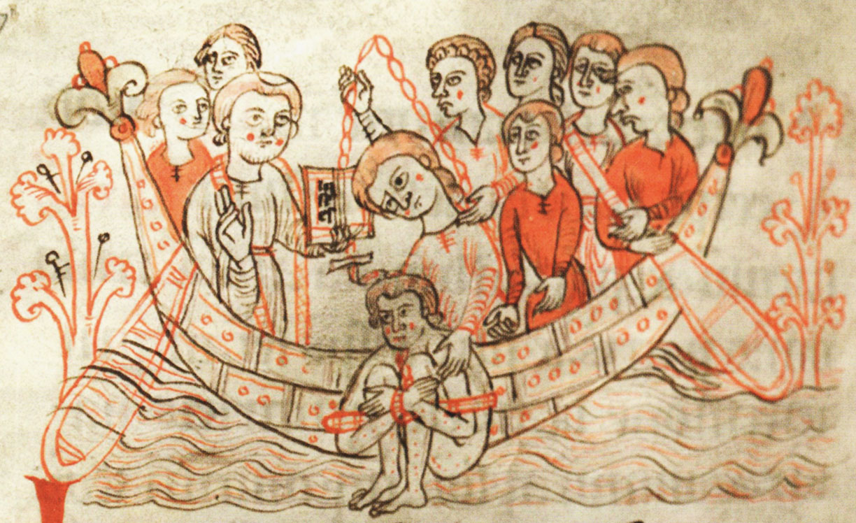 Wasserprobe. Bei dieser Form des Ordals wurde der Kandidat gebunden im Wasser versenkt, schwamm er obenauf, galt dies als Schuldbeweis. Ausschnitt aus einer Seite des Rituale in der Stiftsbibliothek Lambach. Cml LXXIII. f. 64v, 72r (Ende des 12. Jahrhunderts) }